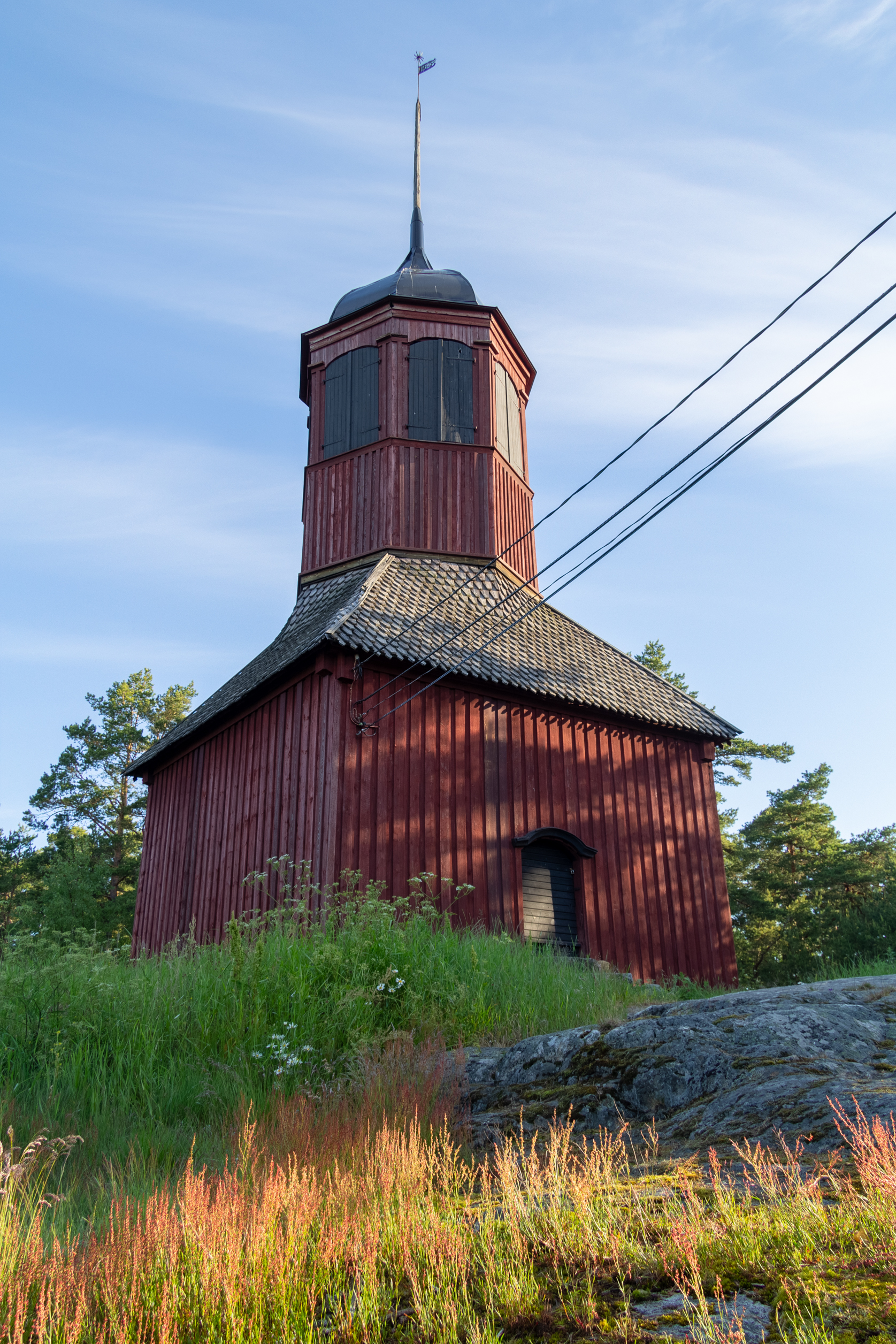 En närmare bild på Nagus Kyrkas klockstapel.